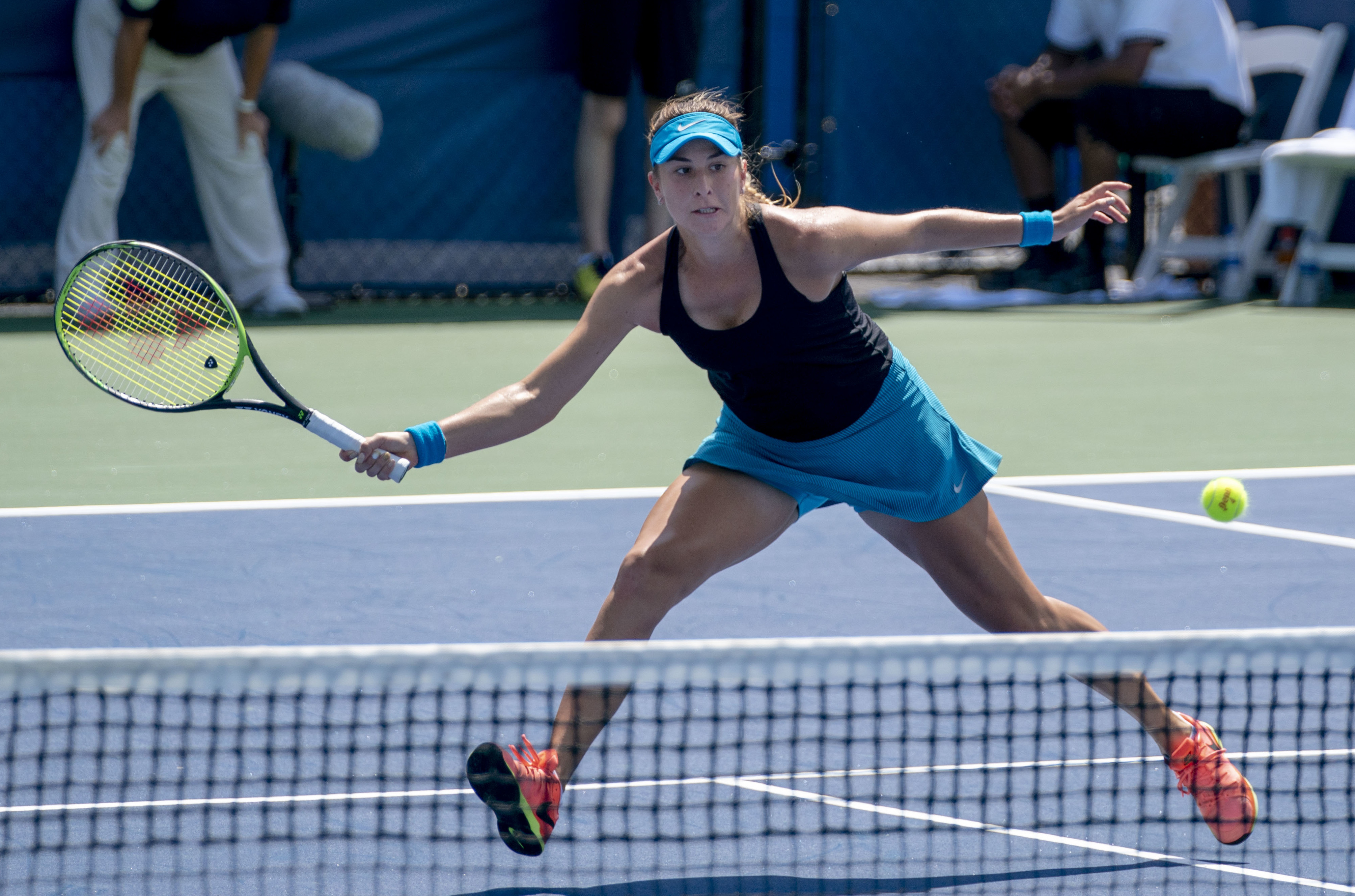 2018 Citi Open Tennis